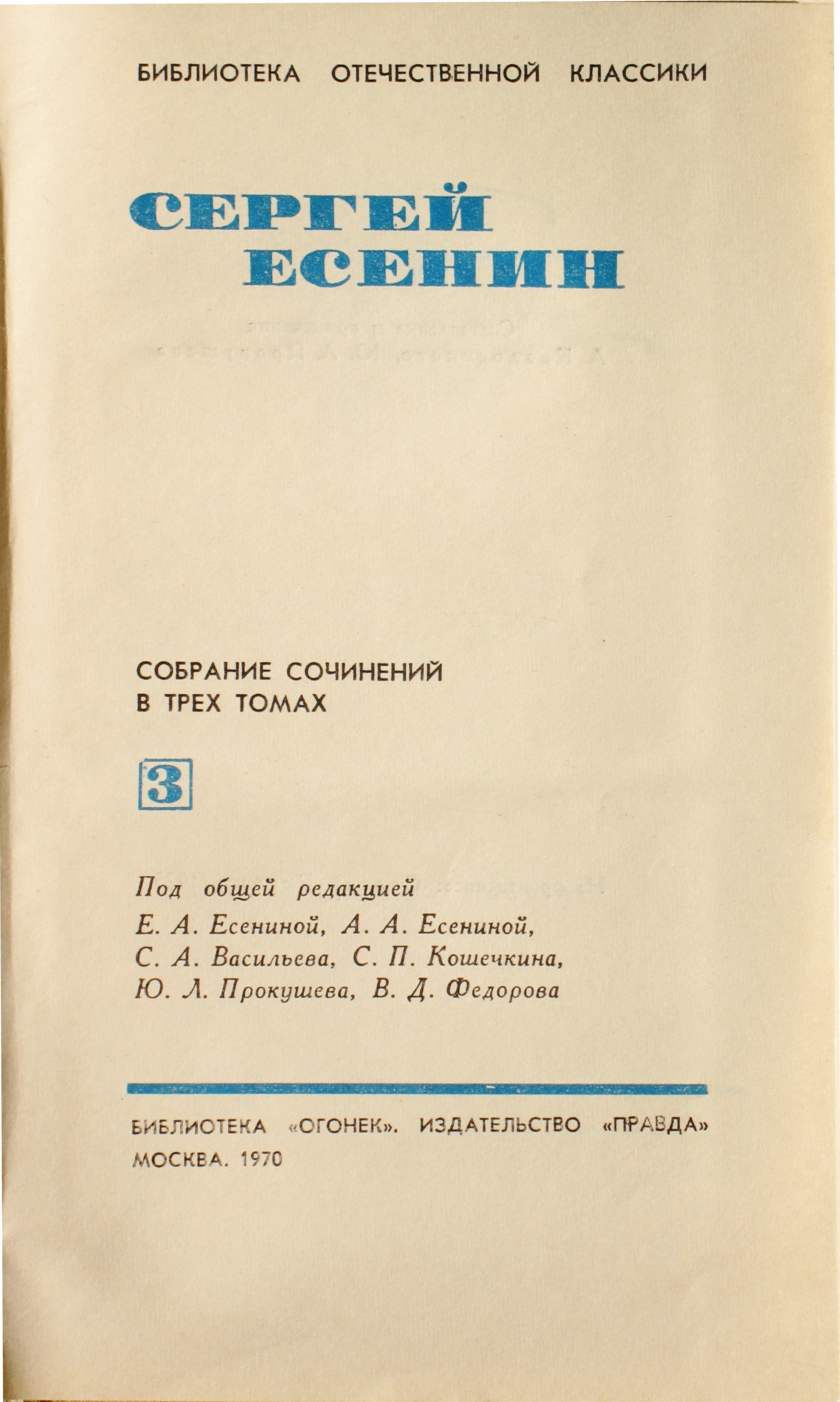 Сергей Есенин. Сочинения в трёх томах. Библиотека "Огонёк", Библиотека отечественной классики. Титульный лист 3-го тома.